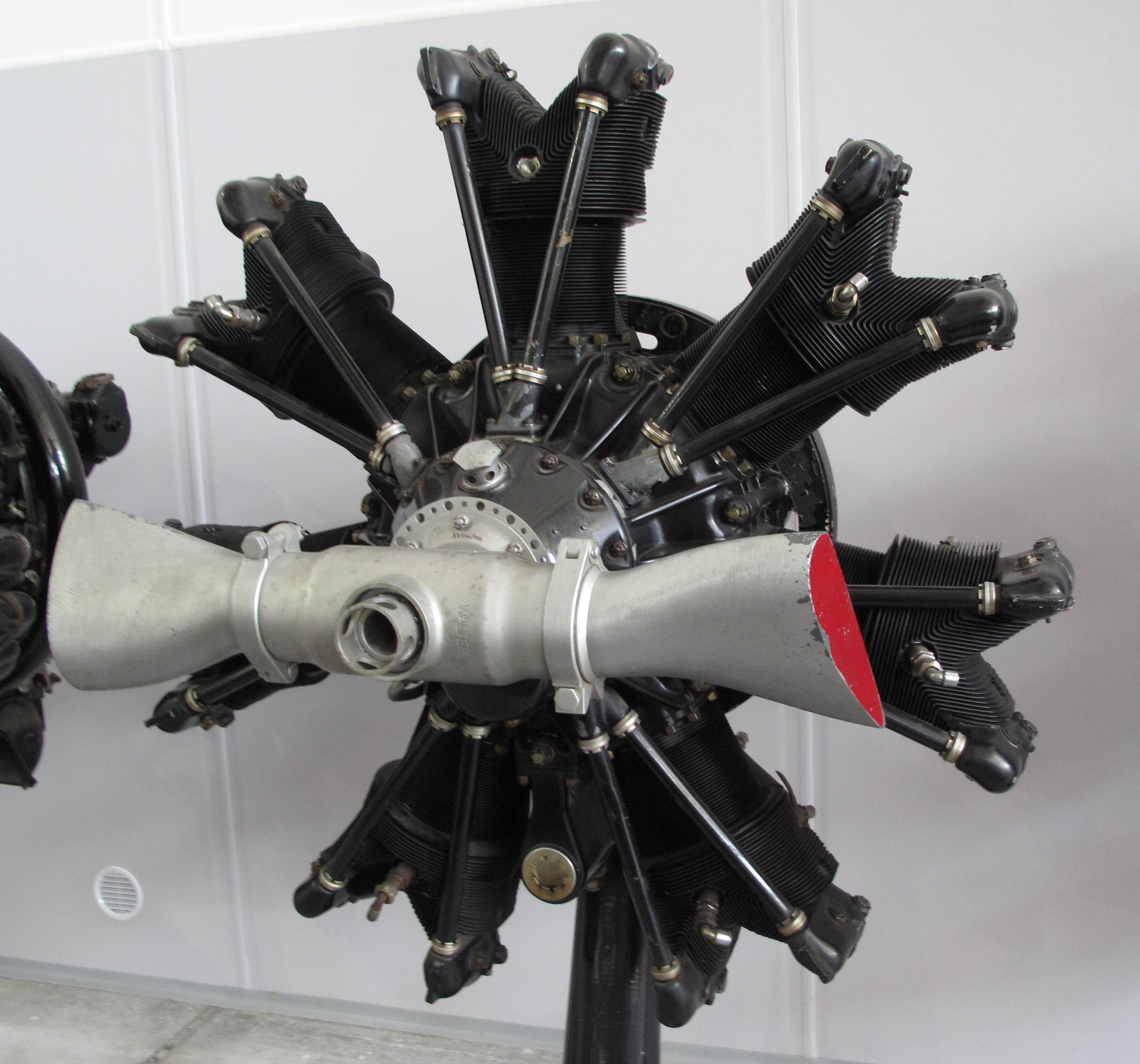 Letecké muzeum Kbely